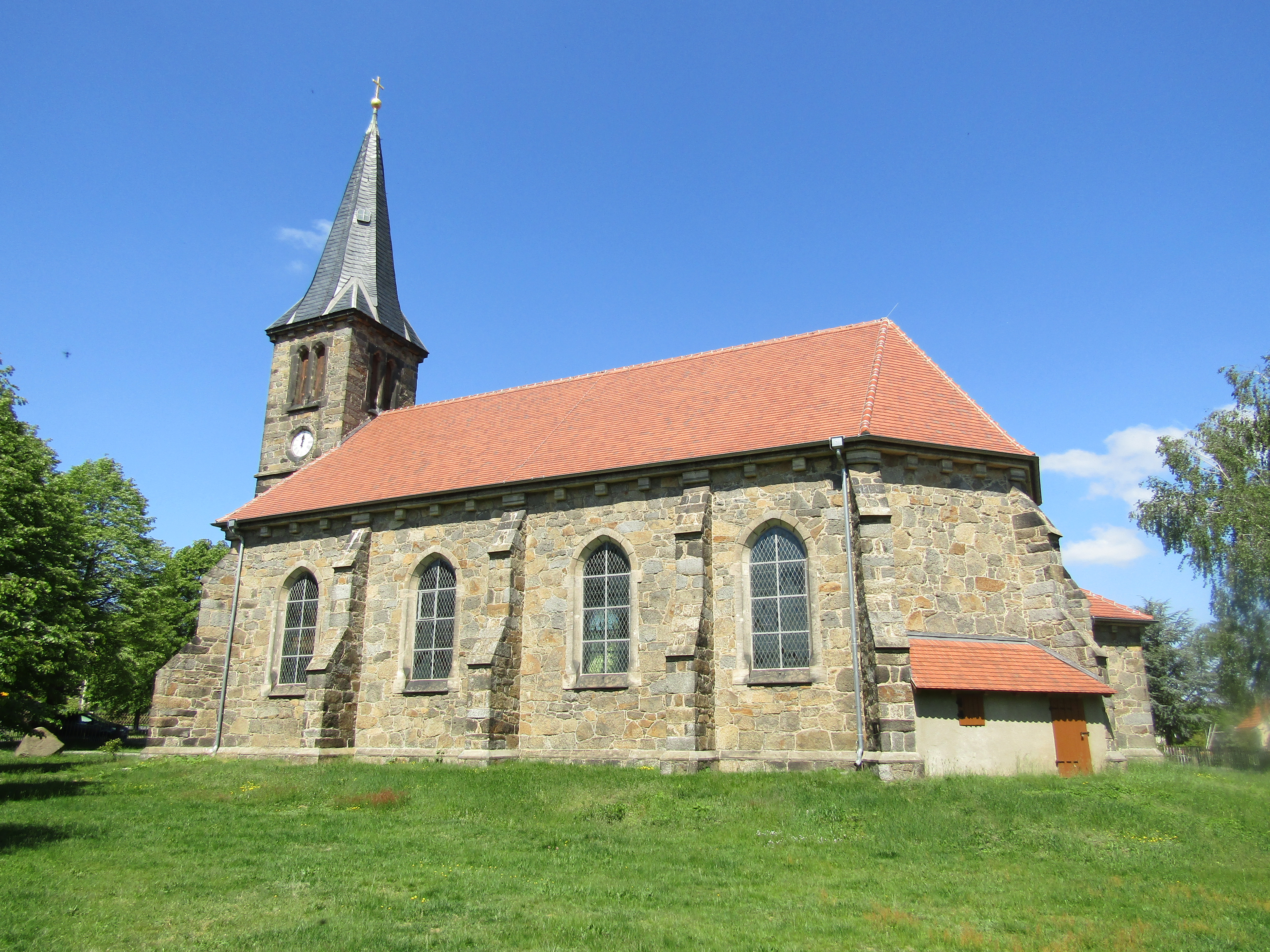 Die Dorfkirche in Luppa Hornjoserbsce: Ewangelska cyrkej we Łupoji